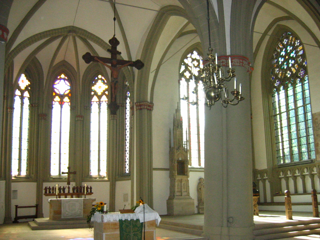 Der „verdoppelte“ Chorraum der St.-Marien-Kirche in Lemgo.